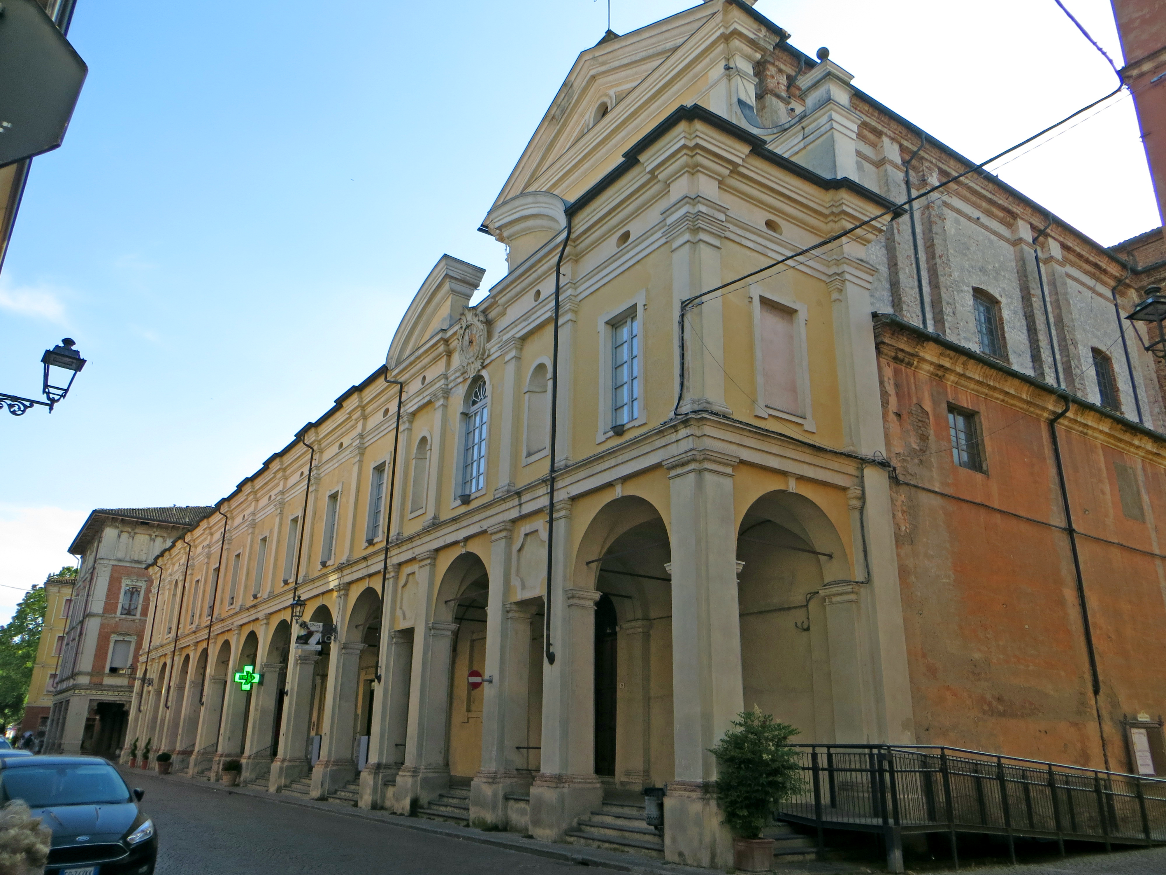 Collegio di Sant'Ignazio di Loyola (Busseto) - facciata